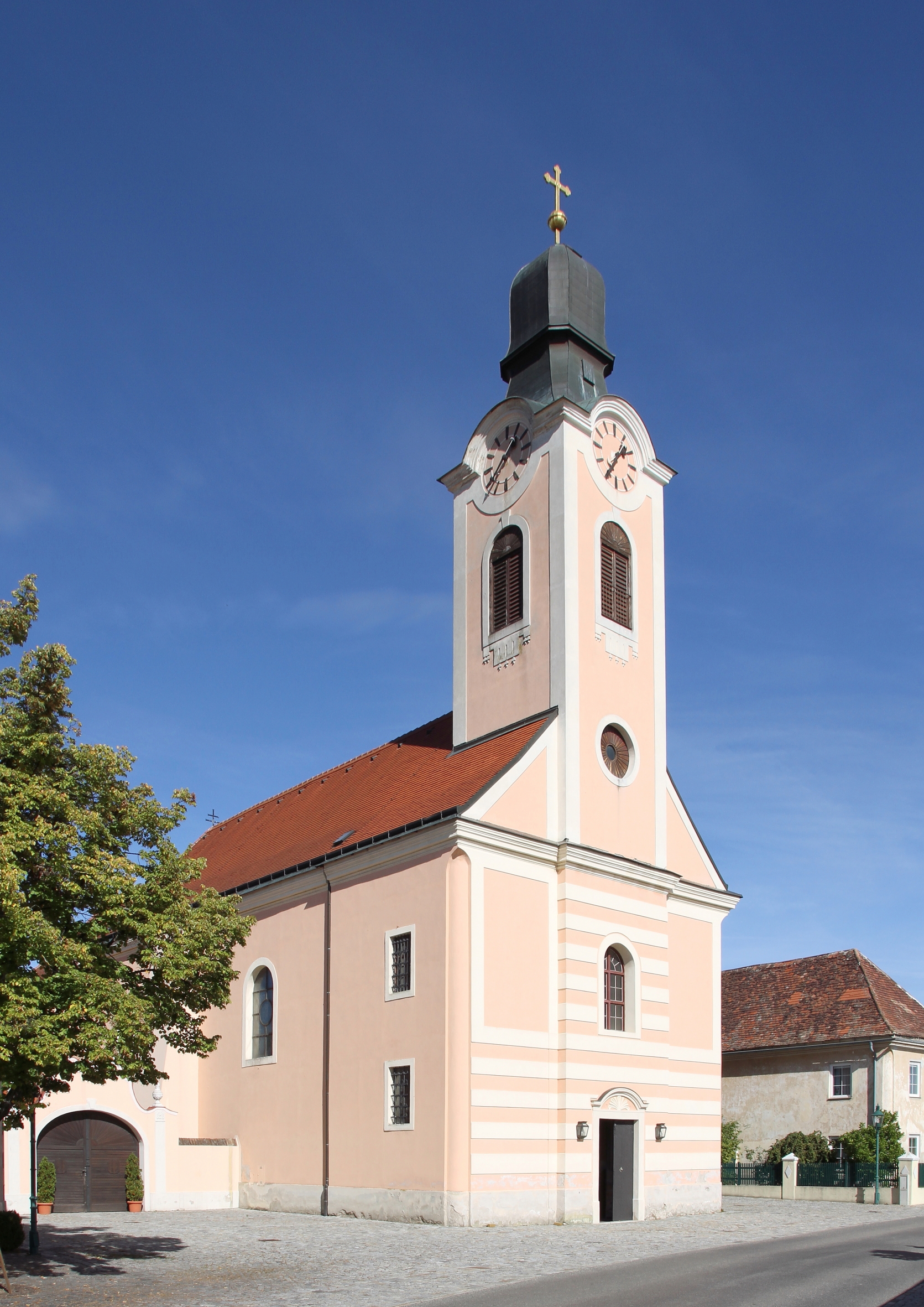 Katholische Pfarrkirche hl. Andreas in der niederösterreichischen Marktgemeinde Grafenwörth. 1791 wurde diese Saalkirche im josephinischen Stil errichtet.